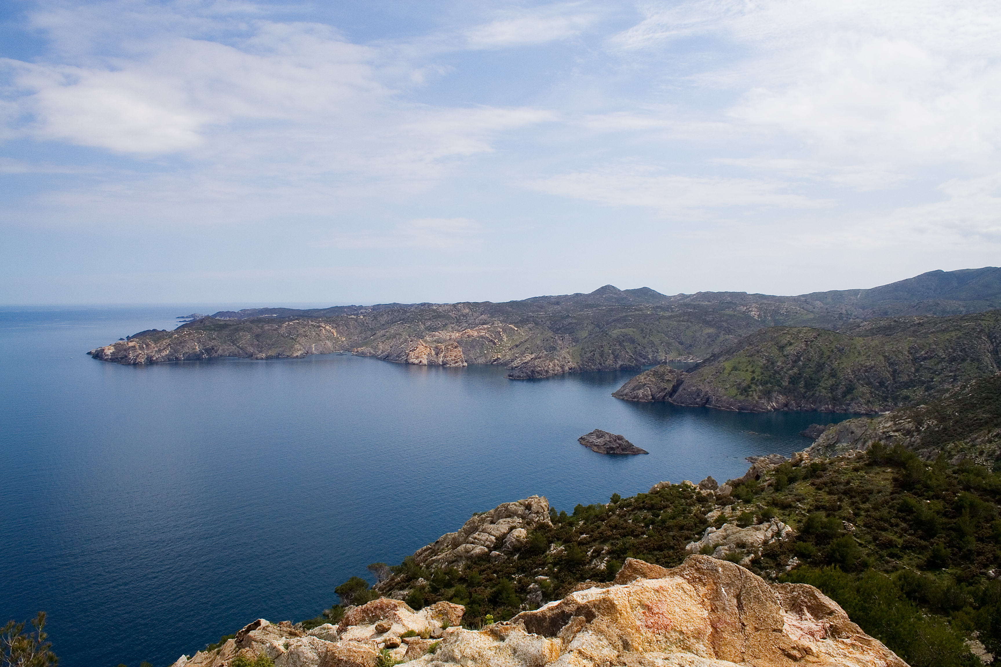 El Golfet viewed from Cap Gros, Cap de Creus